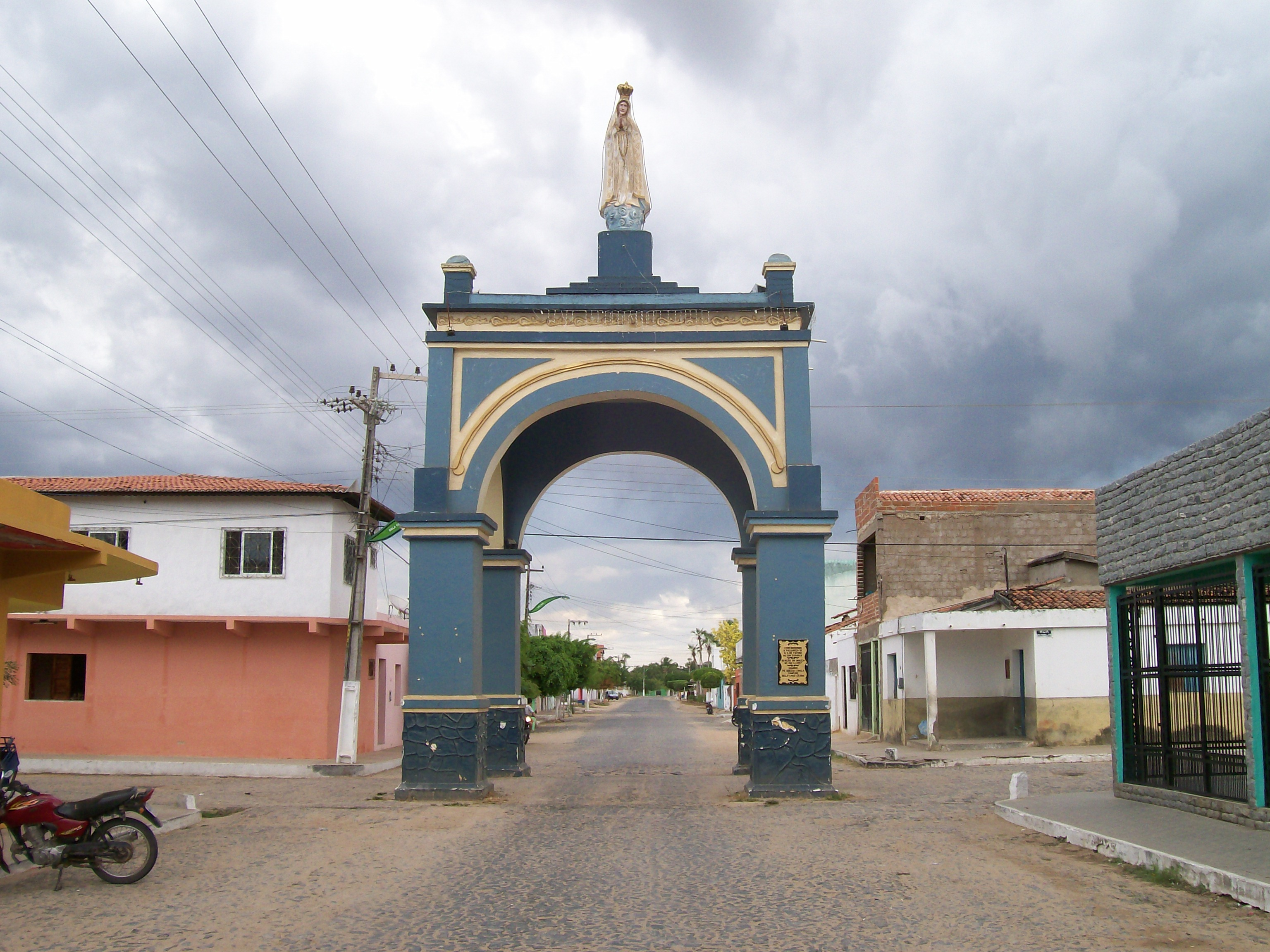 Arco